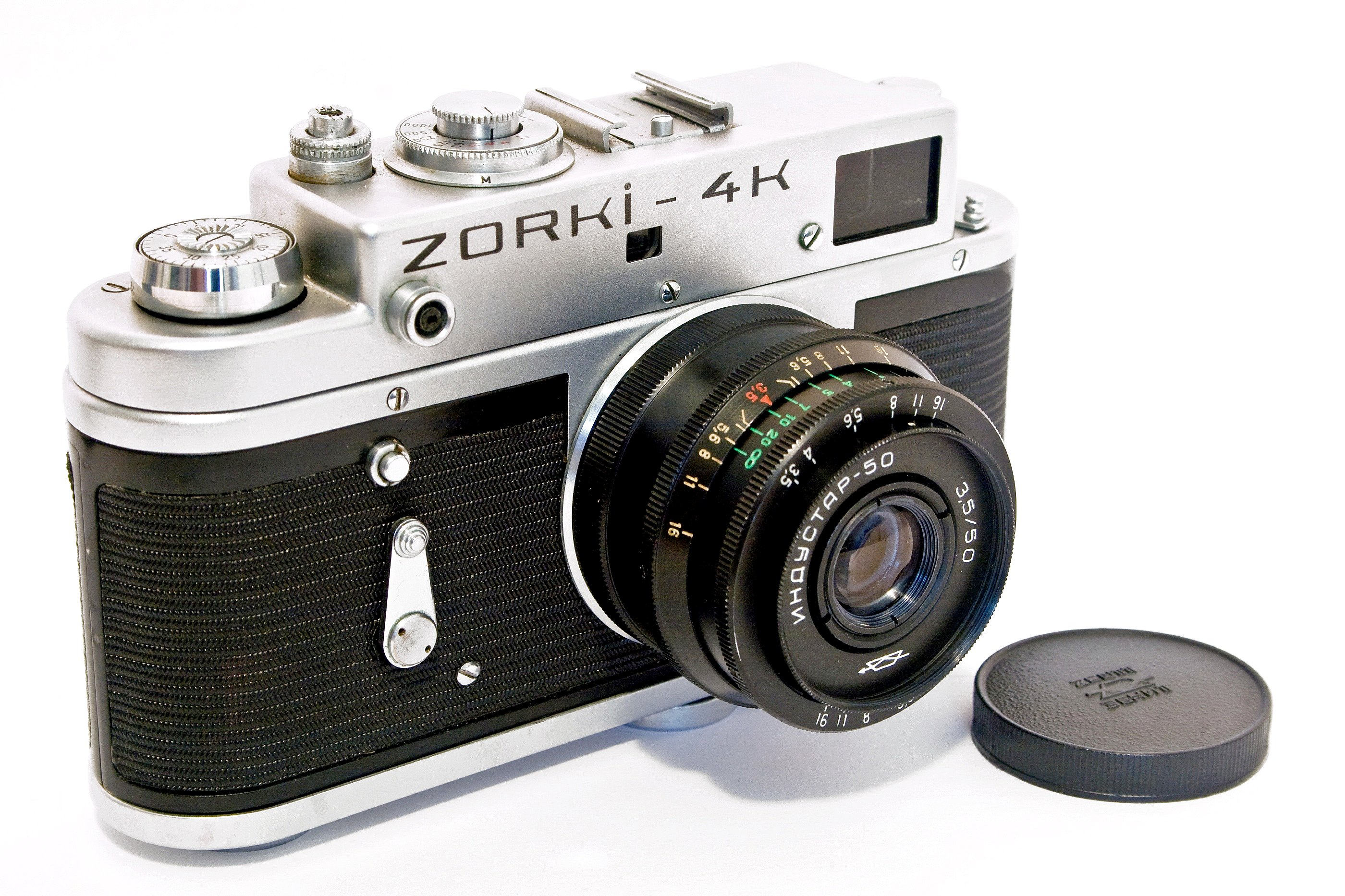 Zorki 4k - Década de 70